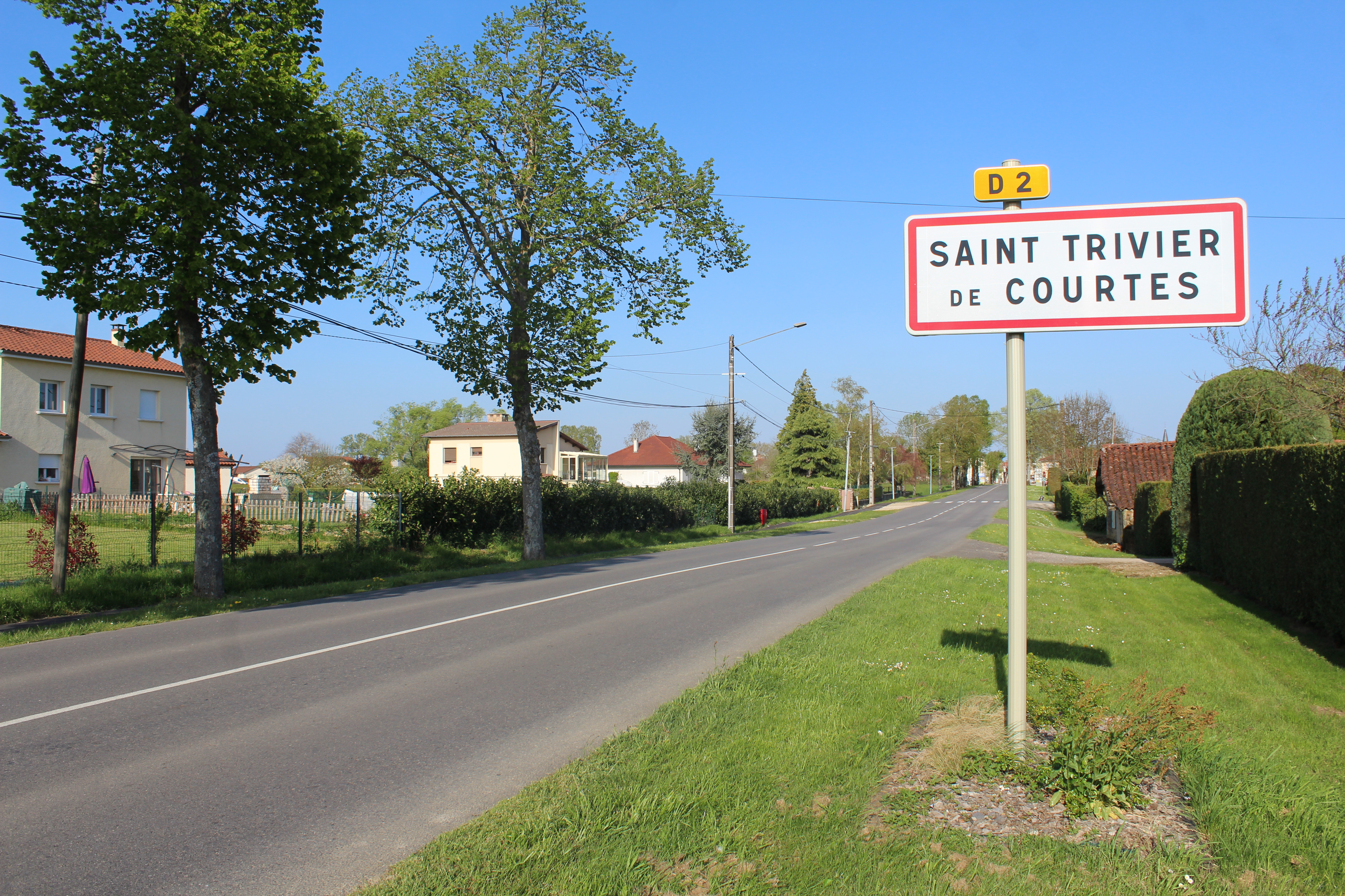 Panneau d'entrée dans Saint-Trivier-de-Courtes.